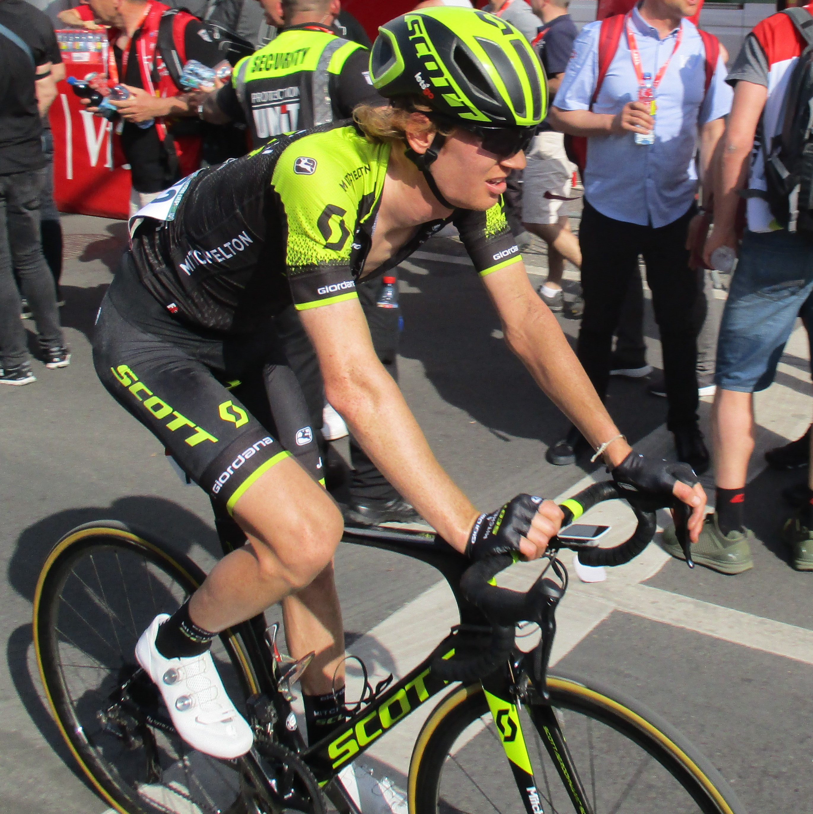 Finish van Luik-Bastenaken-Luik 2018 in Ans.